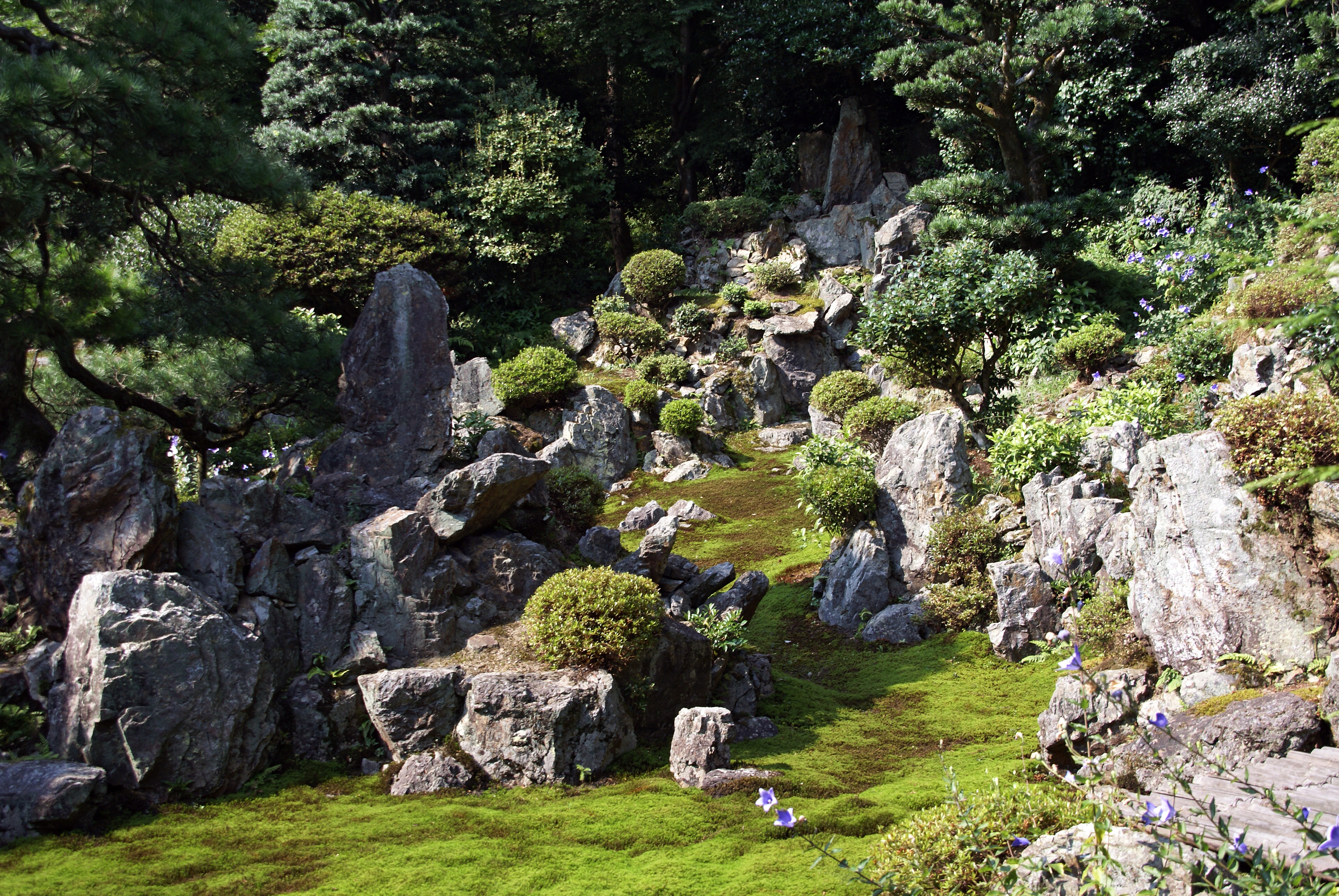 Seiganji in Maibara, Shiga prefecture, Japan